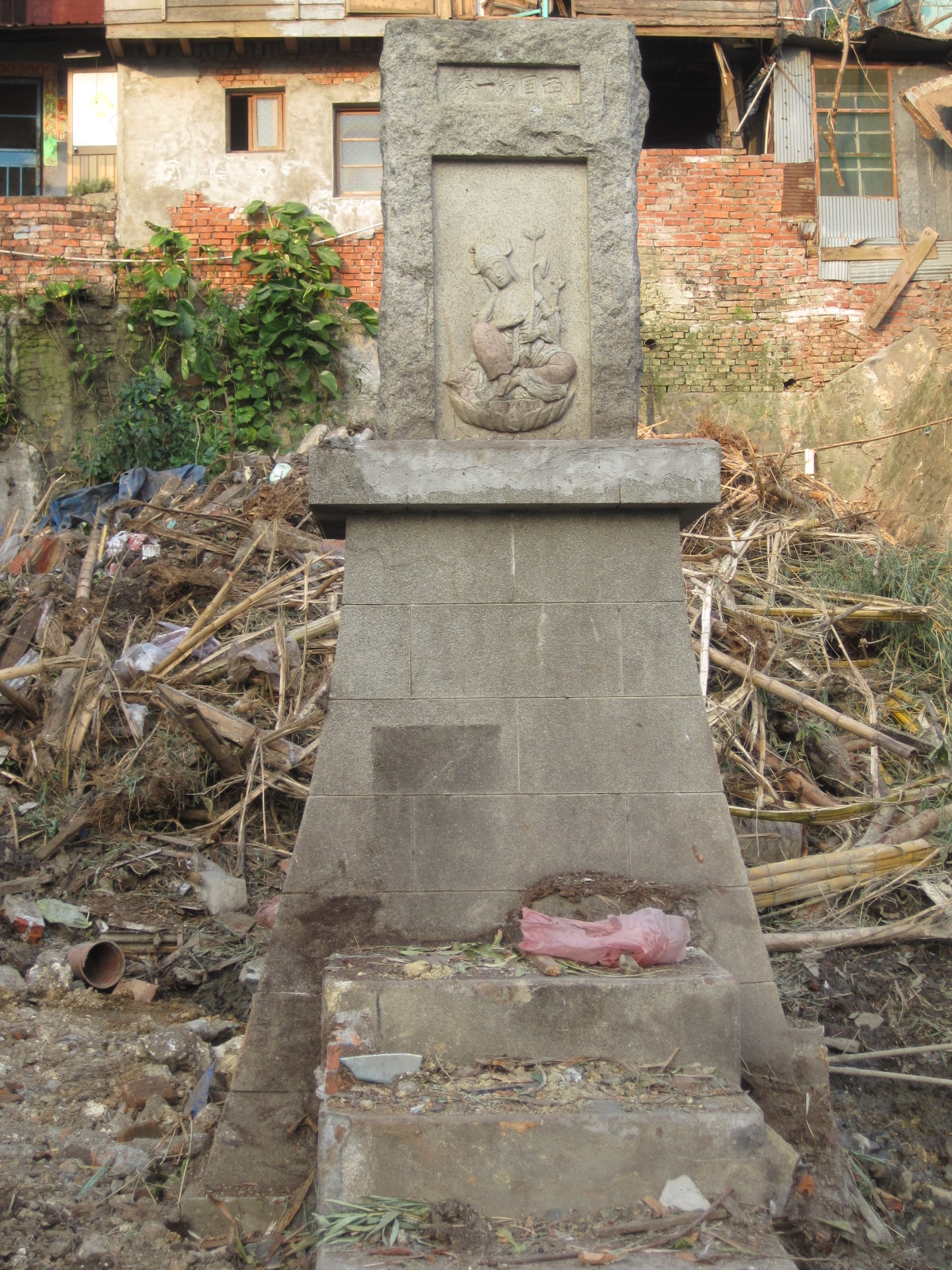 高雄壽山千光路石塔